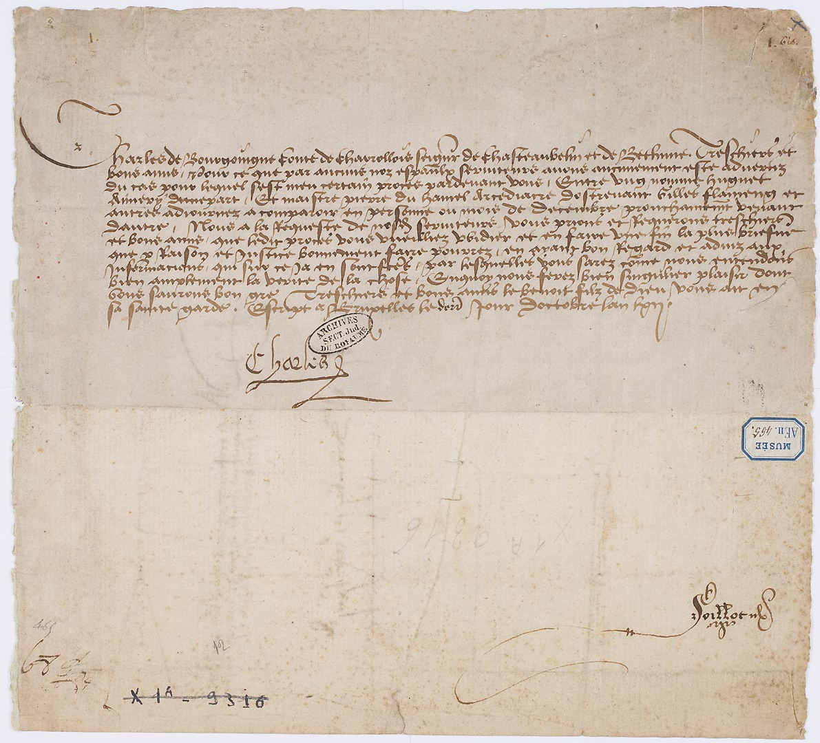 Le comte Charles de Charolais (Charles le Téméraire) écrit au parlement de Paris pour hâter le jugement d’un procès auquel il s’intéresse. Bruxelles, 30 octobre 1462